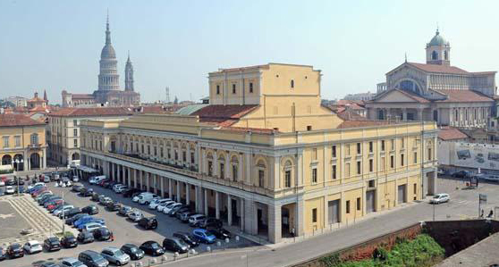 Teatro Coccia vista posteriore